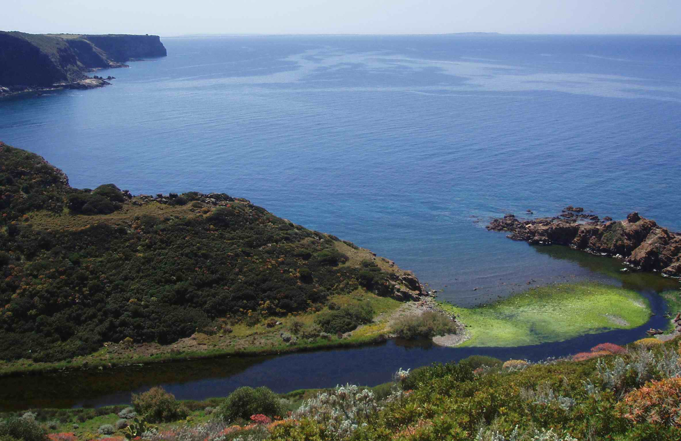 Località Foghe: foce del Rio Mannu